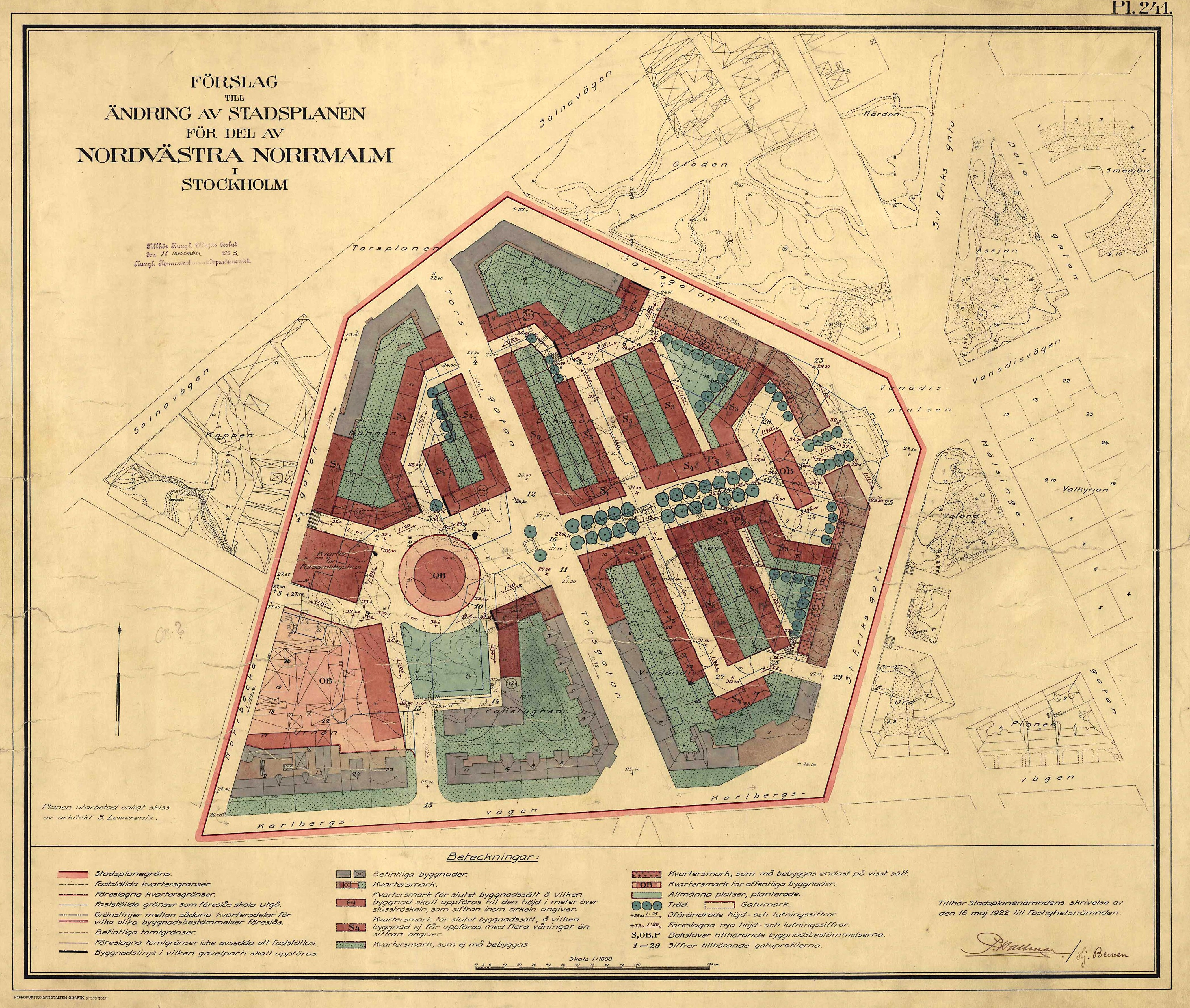 "Röda bergen" i Vasastan i Stockholm, stadsplan